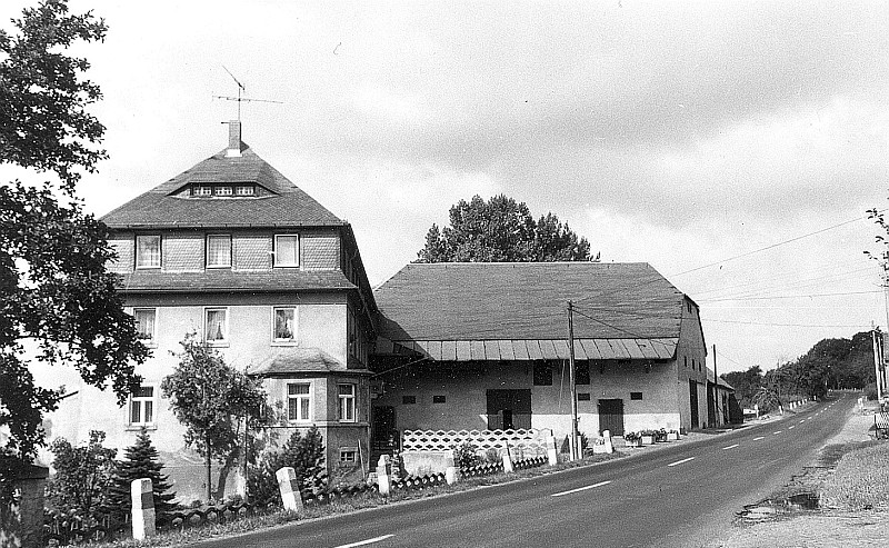 Original image description from the Deutsche Fotothek Göda-Prischwitz. Ehem. Mühle